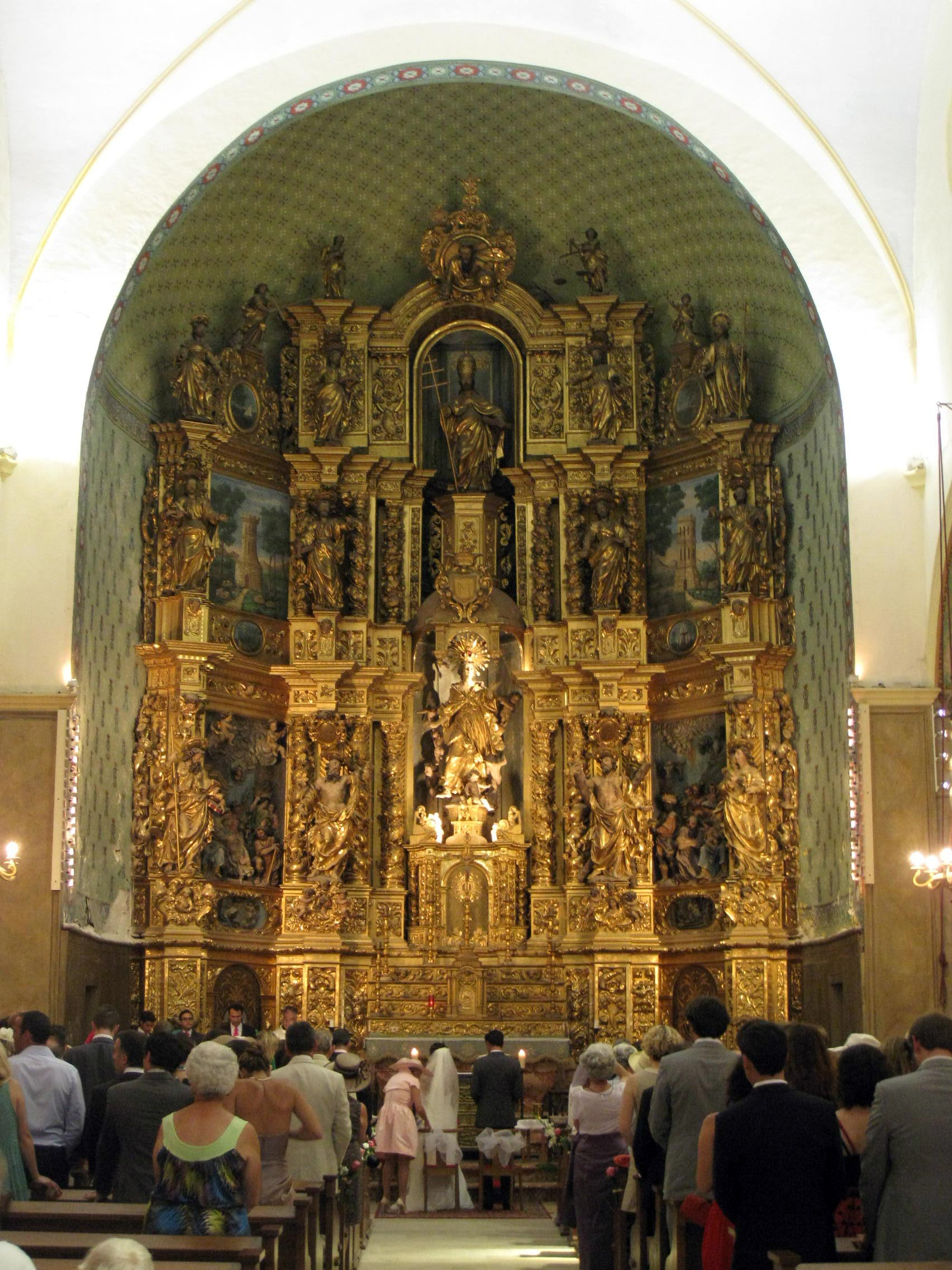 Església de Santa Maria i torre contigua amb rellotge (Cotlliure)